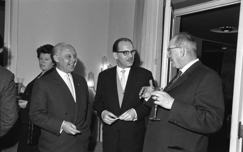 Der Präsident des Bundesrates empfängt Ministerpräsidenten der Länder, Mitglieder des Bundesrates und Mitglieder des Deutschen Presseclubs e.V., Bonn im Presseclub v.l.n.r.: Regierungsdirektor Bahs Minister Trittelvitz Regierungsdirektor Dr. Katzenberger